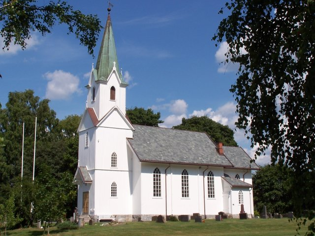 Garder kirke i Vestby kommune, Akershus, Norway